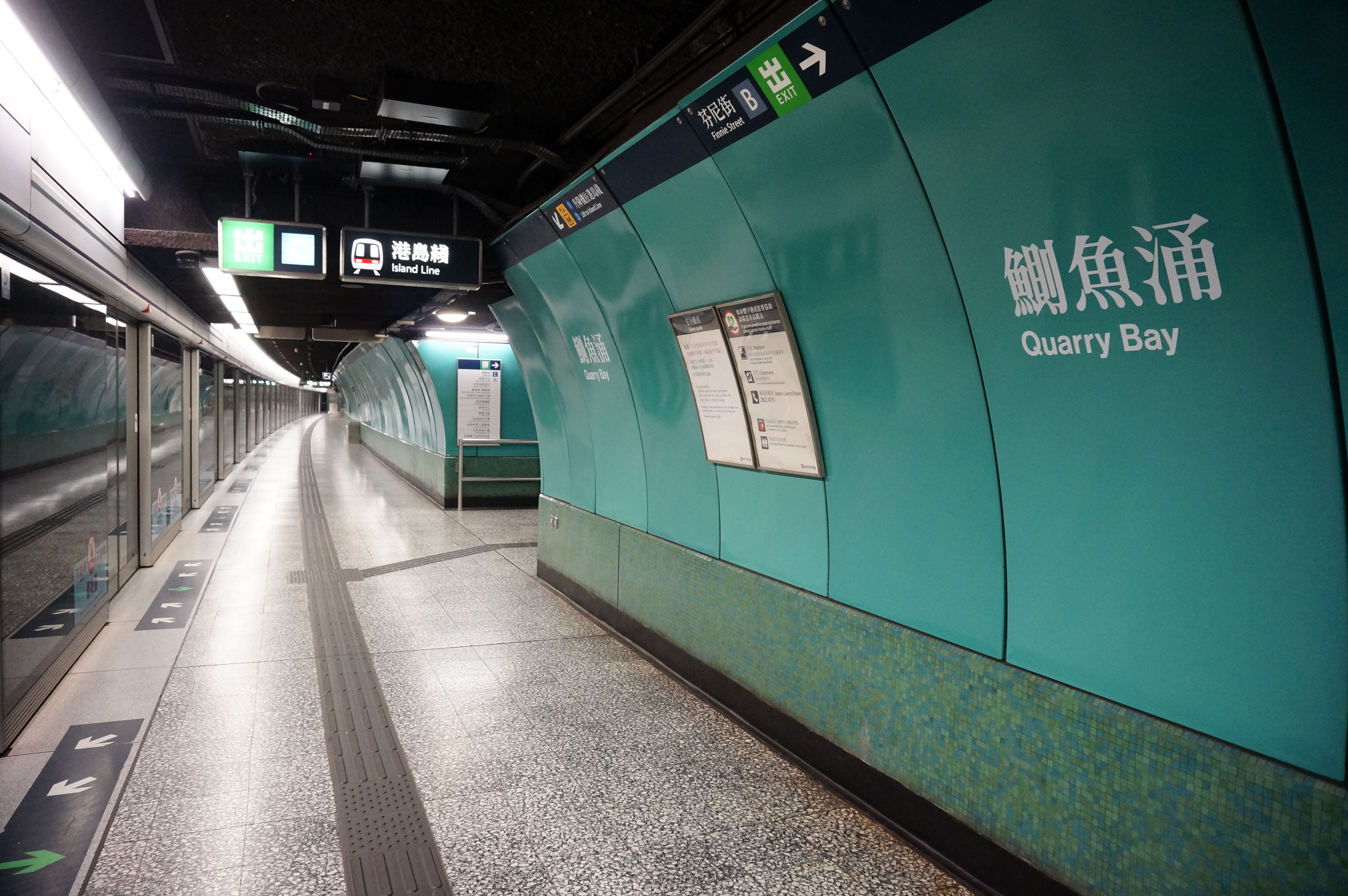 港鐵鰂魚涌站月台